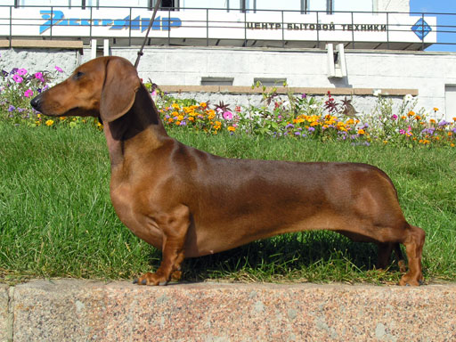 Такса стандартная гладкошерстная Template:Bl